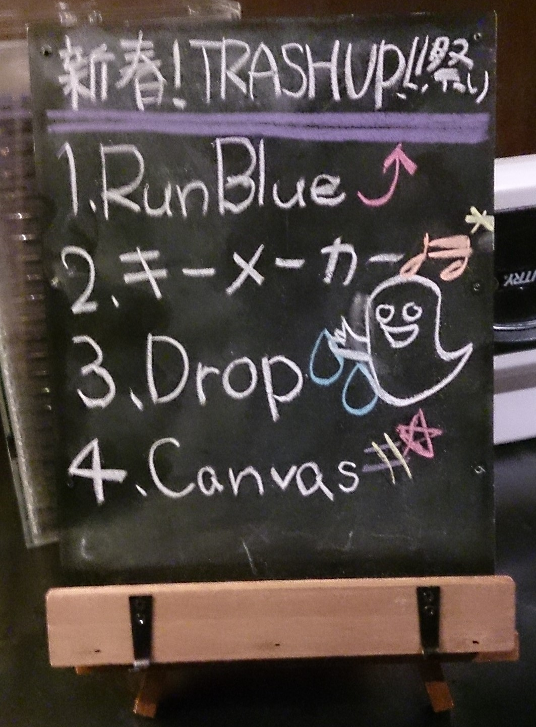 amiinaセトリボード(20150129(1))